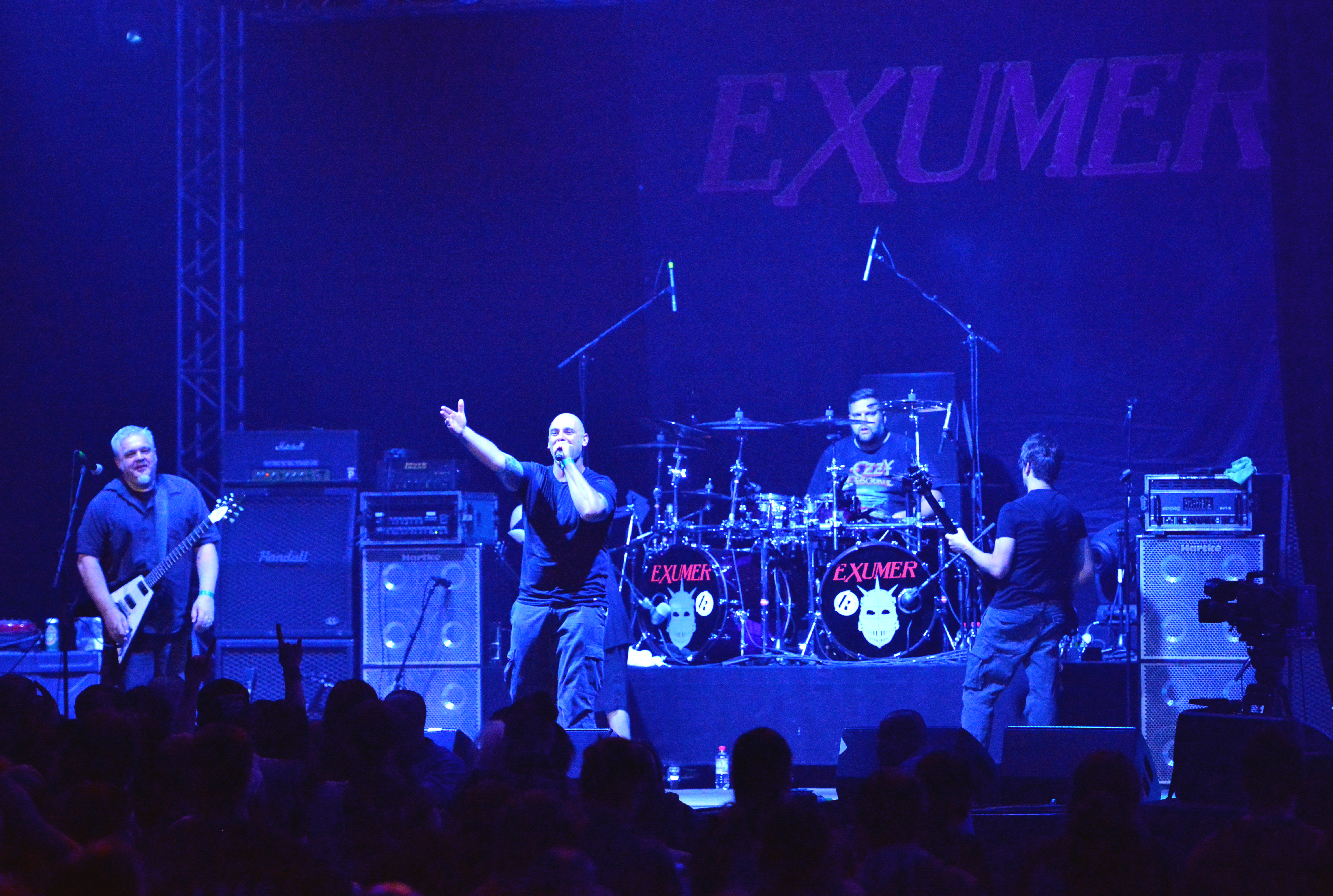 Exumer beim Wacken Open Air 2015